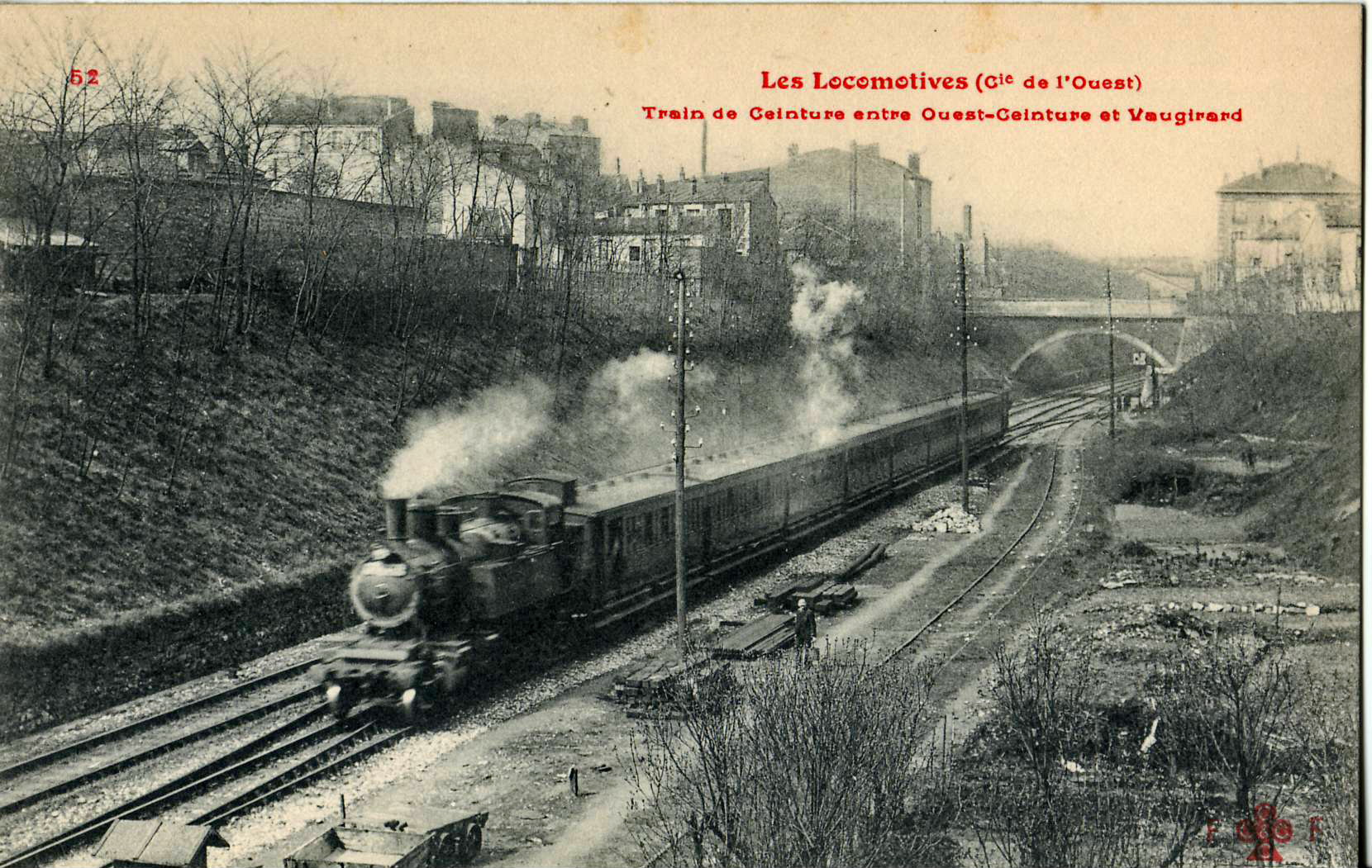 Carte postale ancienne éditée par FF - CCCC, série Les locomotives (Cie de l'Ouest), n°52 : Train de Ceinture entre Ouest-Ceinture et Vaugirard